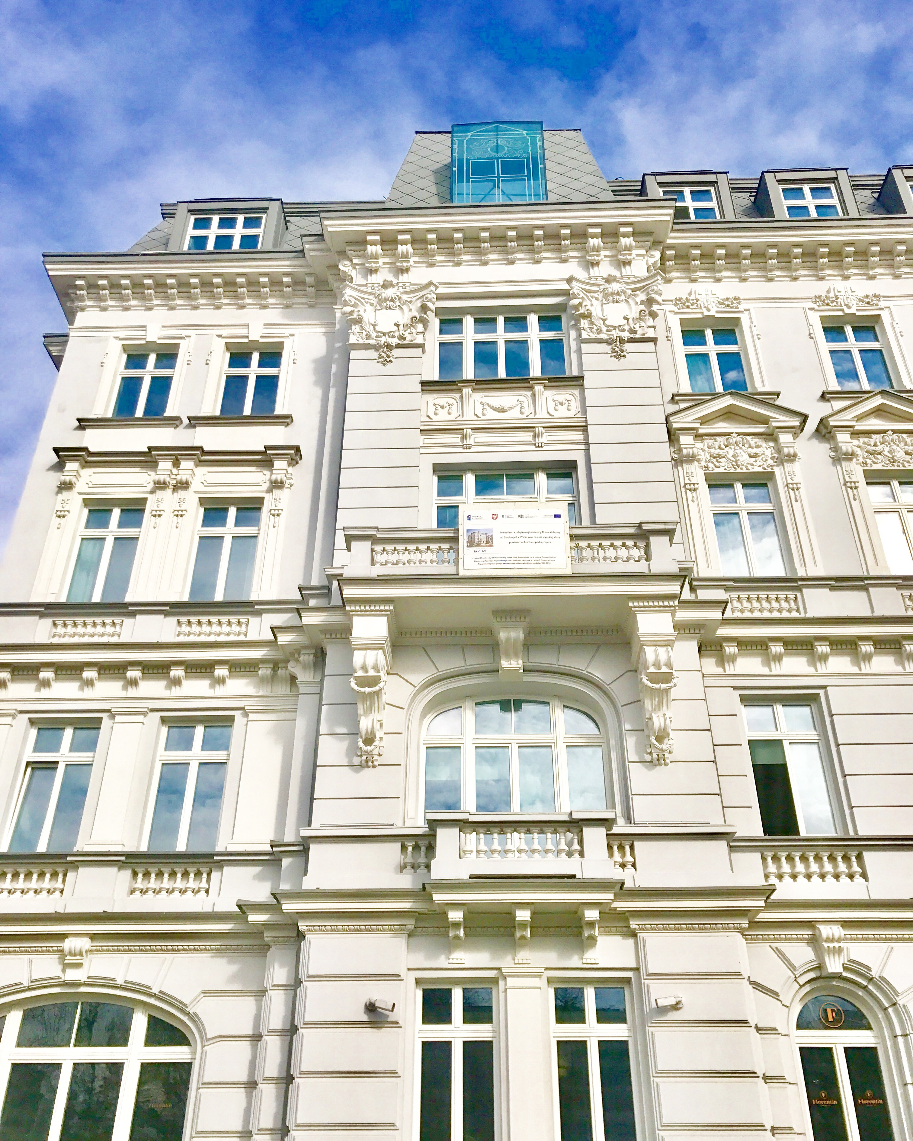 Fasada kamienicy Branickich przy ulicy Smolnej 40 w Warszawie